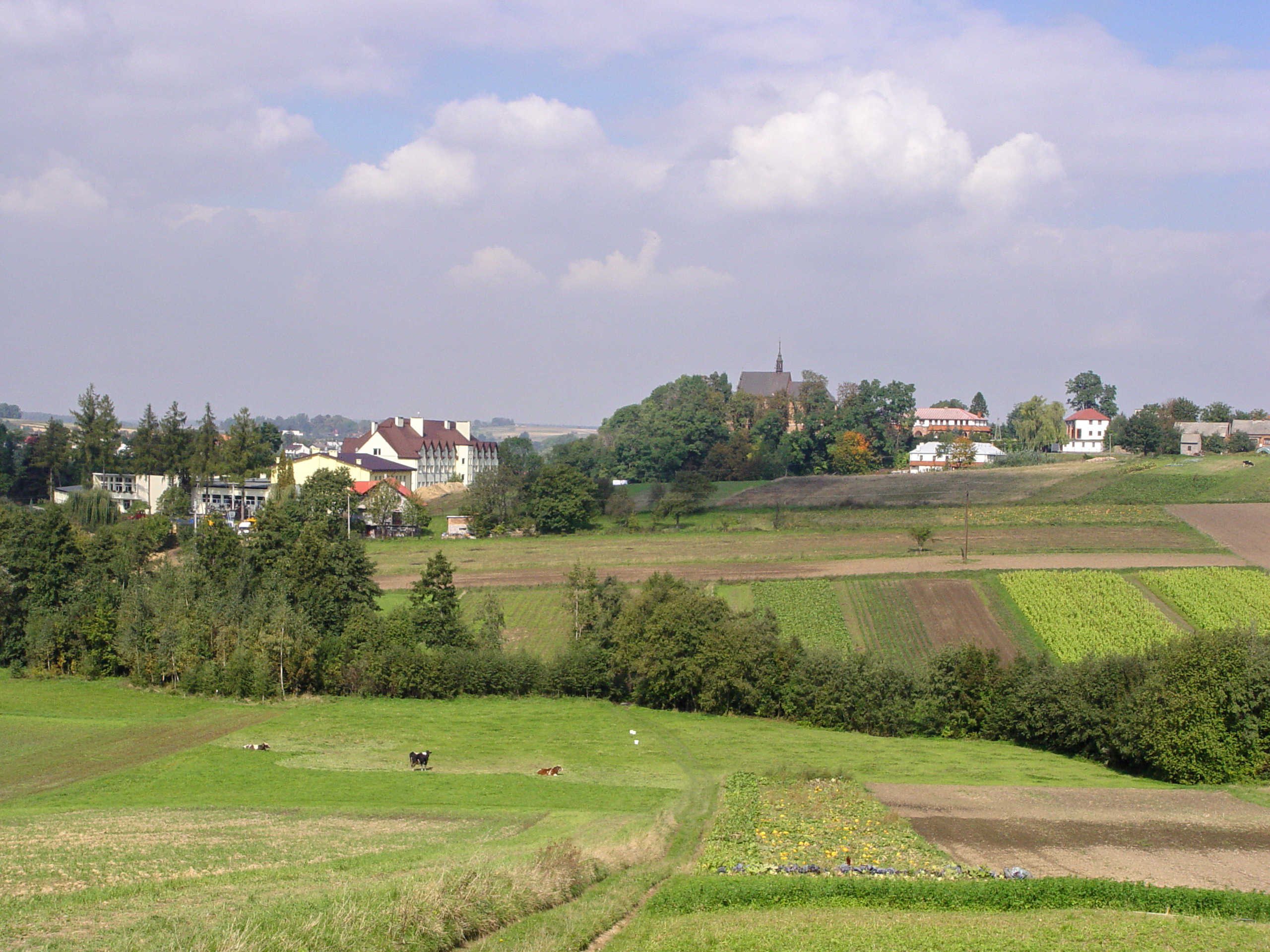 Luborzyca, perspektywa na szkołę podstawową im. 600 lecia UJ, gimnazjum, kosciół, od strony drogi 776 Kraków-Proszowice i Zapusty przysiółka wsi Luborzyca